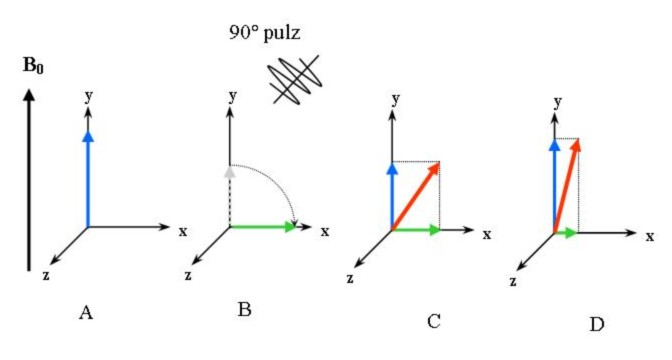 90 puls - MRI